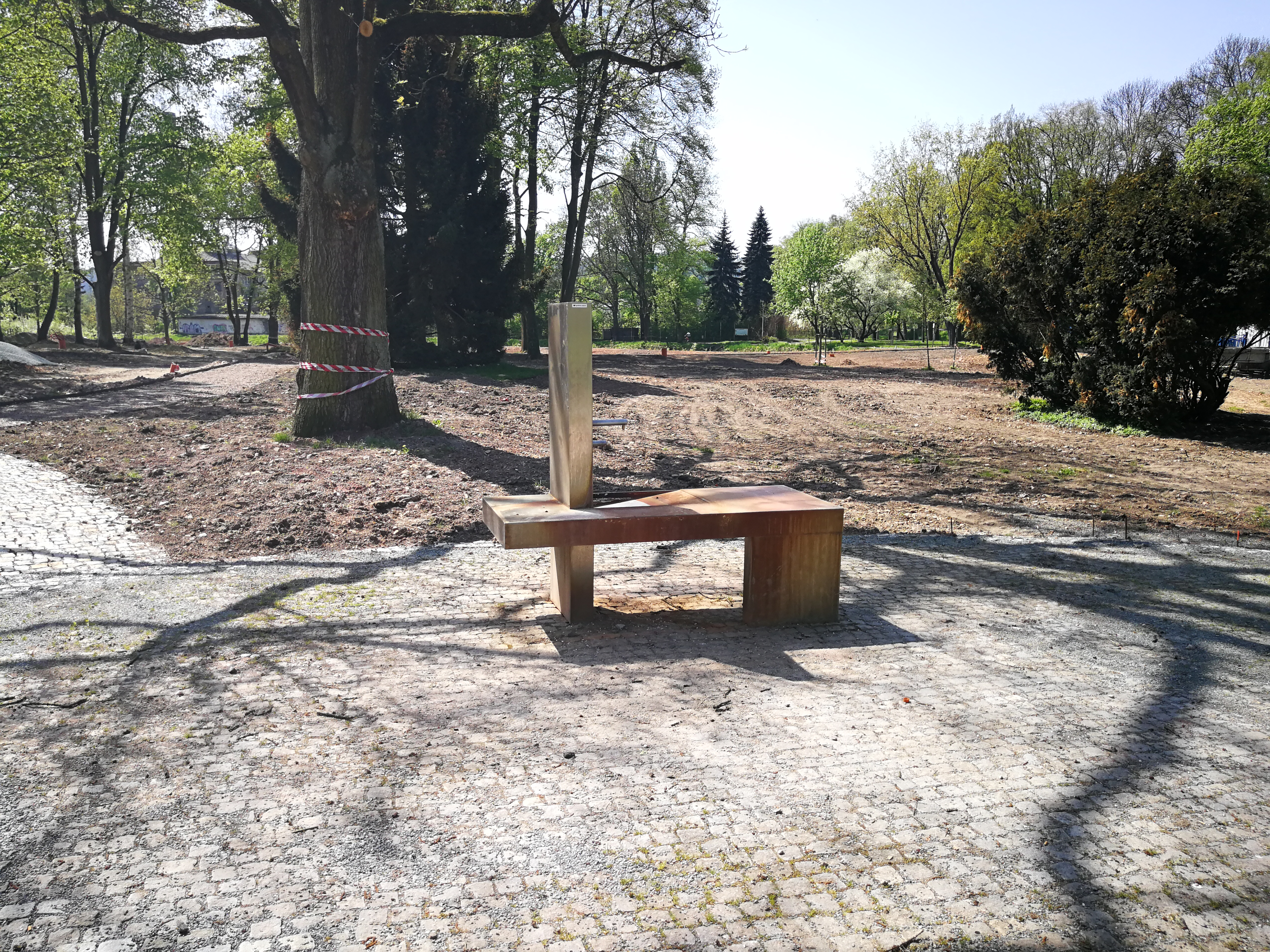 Hronovka and Regnerka, pramen Project: Vodstvo.